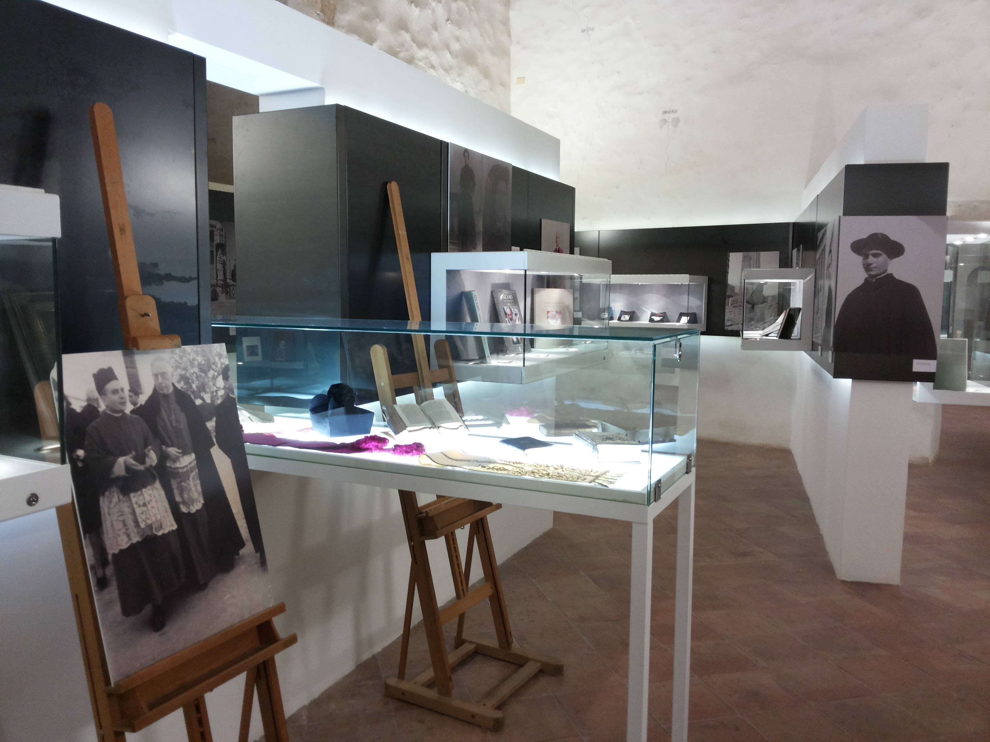 Mostra al Castello dei Conti di Modica di Alcamo sulle opere del Mons. Vincenzo Regina (dicembre 2015)